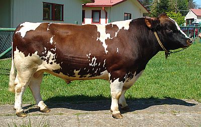 Chacotero, Clavel, Chile